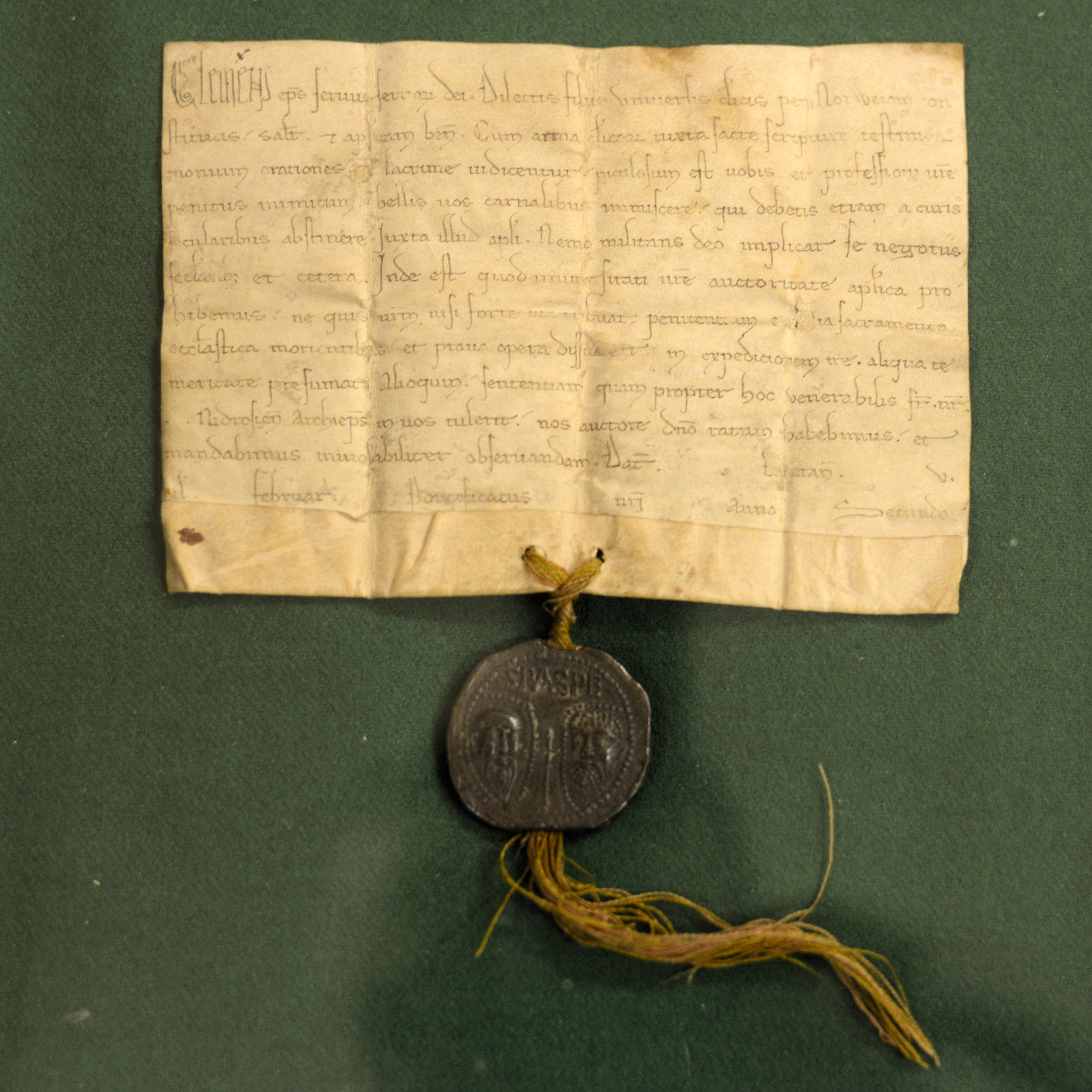 Norges første kjente brev. Pave Clemens III forbyr alle geistlige i Norge å delta i krigstog, uten for å yte de døende kirkens trøst eller for å fraråde onde gjerninger.